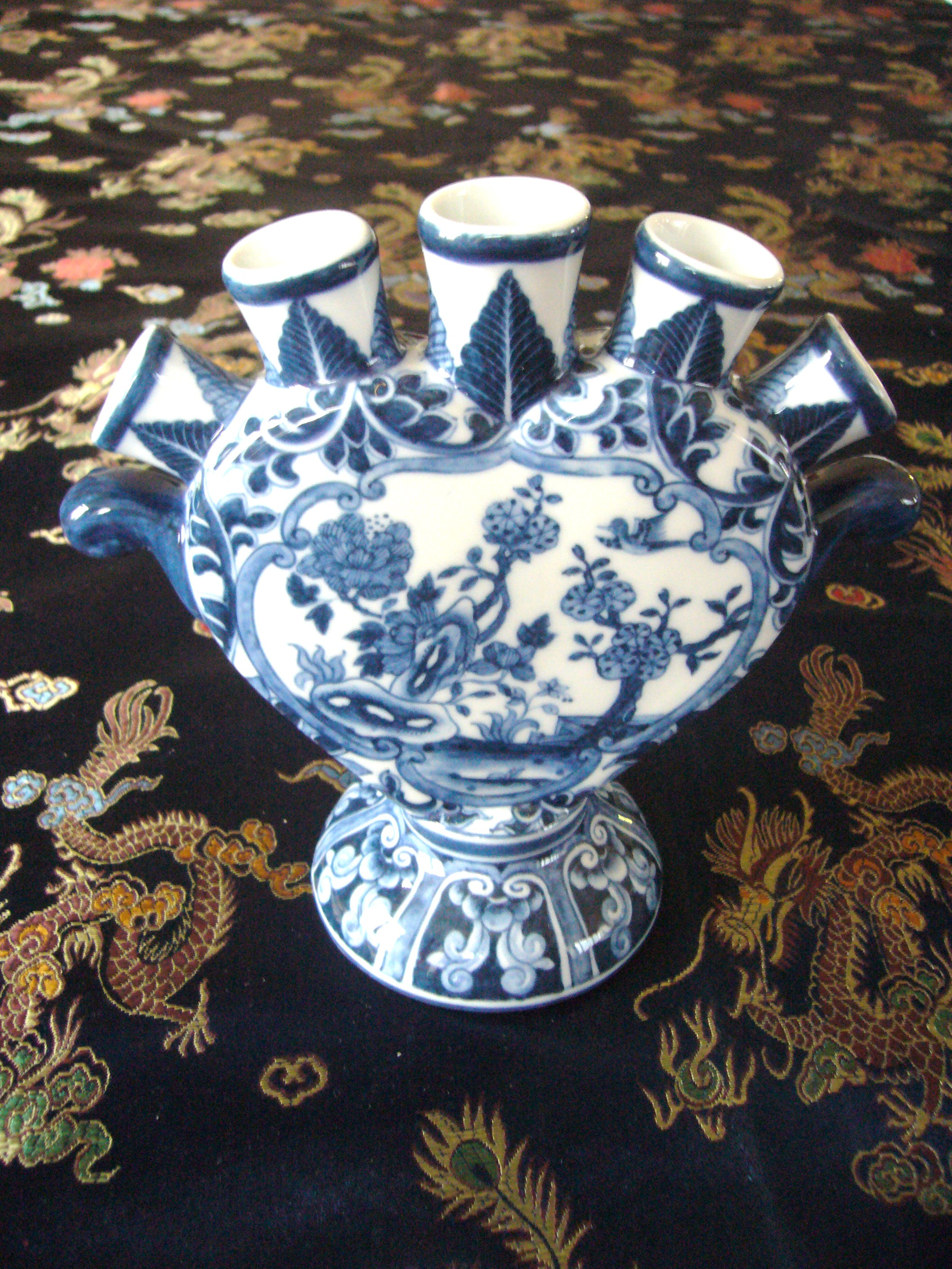 Tulpenvaasje